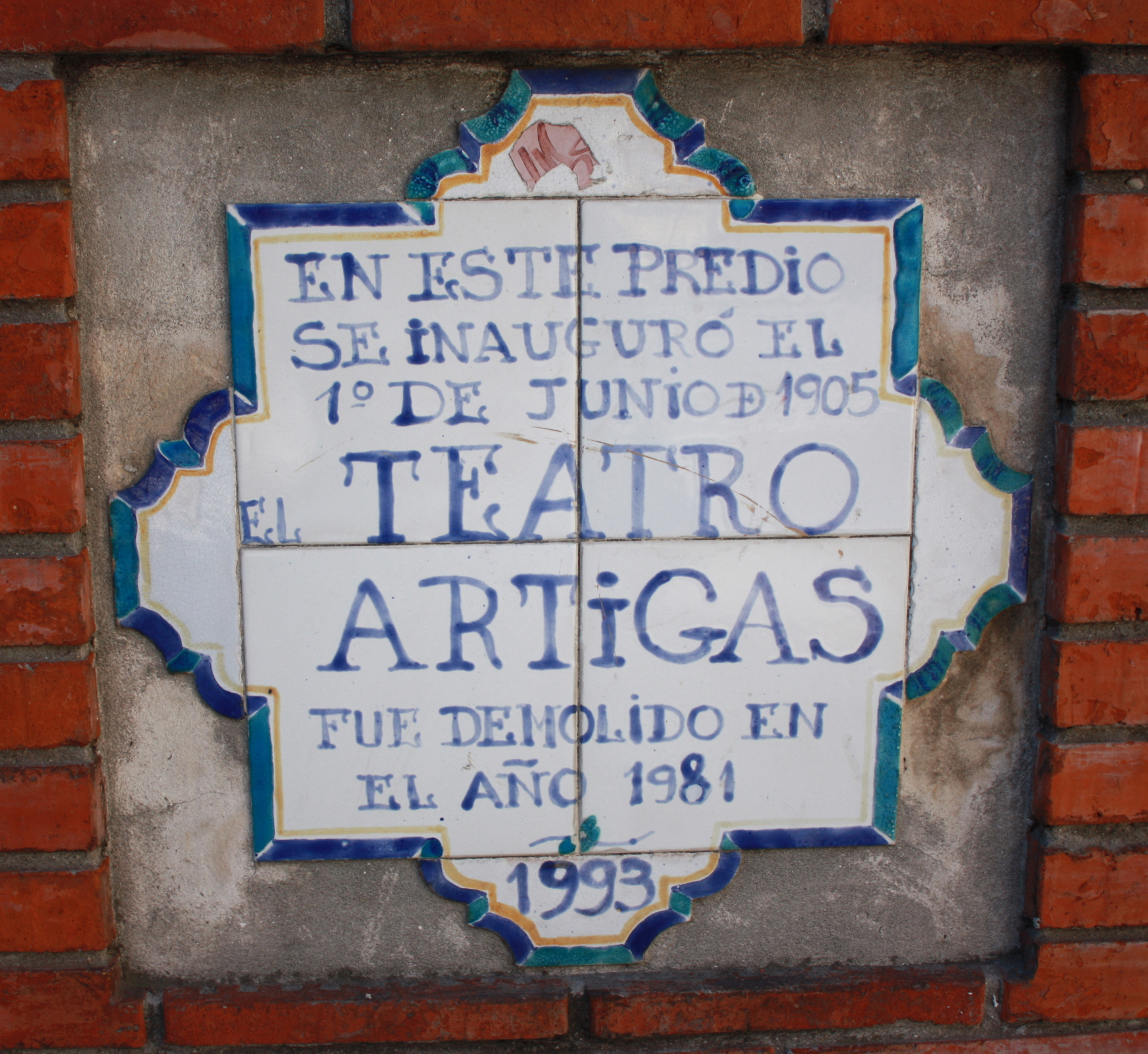 Placa conmemorativa del Teatro Artigas. El teatro estaba ubicado en la esquina sureste de las calles Colonia y Andes. Montevideo.